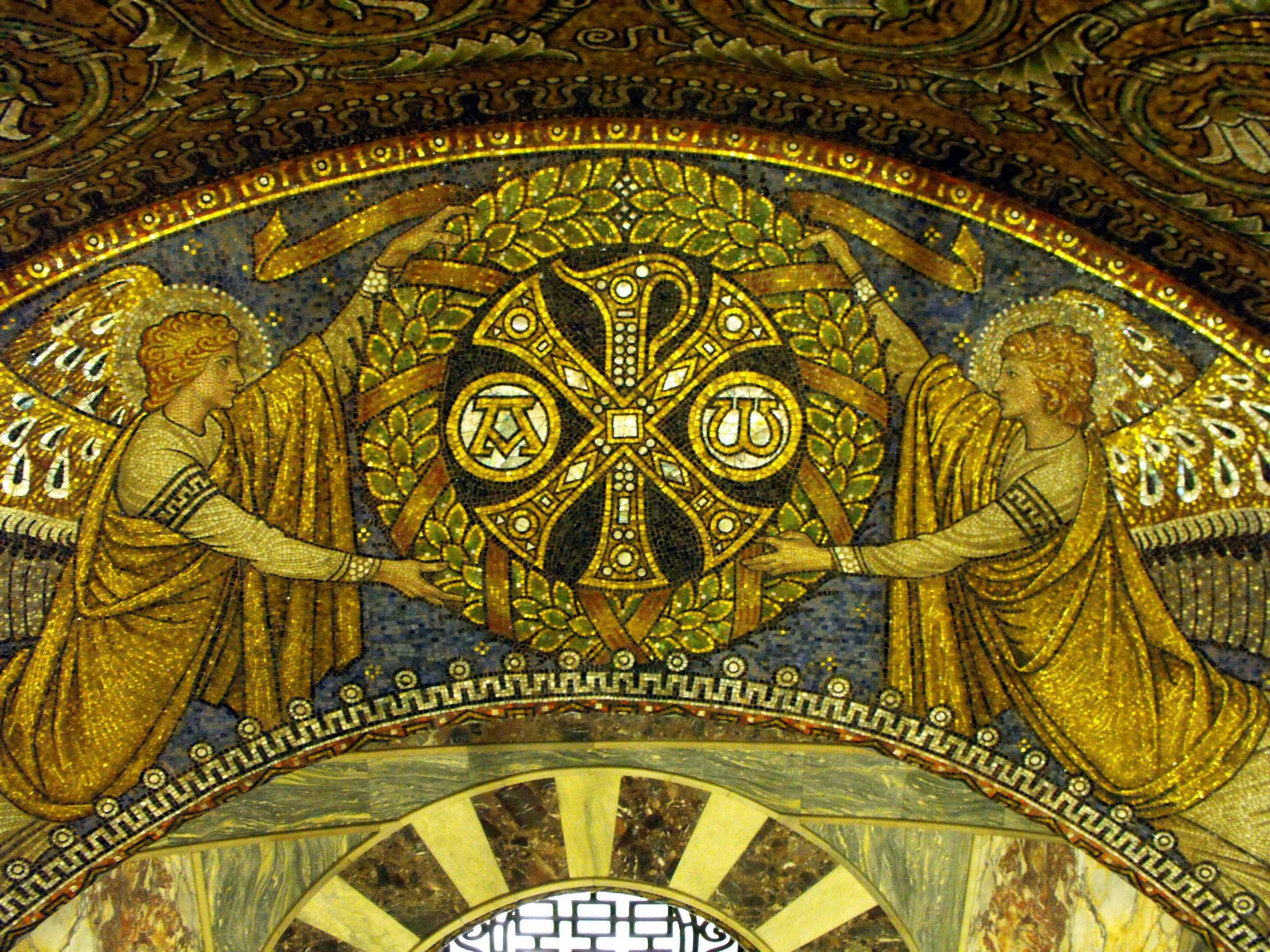 Detail des Kuppelmosaiks des Aachener Domes, nach der Sanierung im Jahr 2011This is a photograph of an architectural monument., no. 0